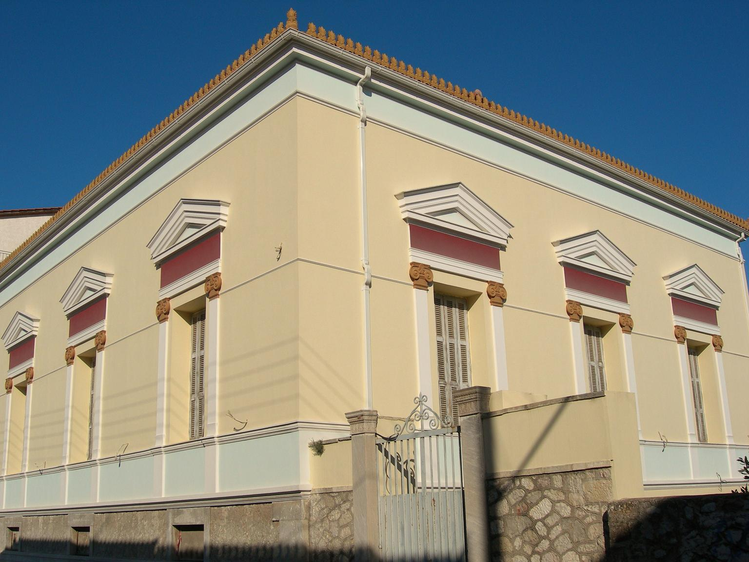 Το αρχοντικό του Γεωργίου Σ. Μεσσηνέζη στην οδό Δεσποτοπούλων στο Αίγιο.